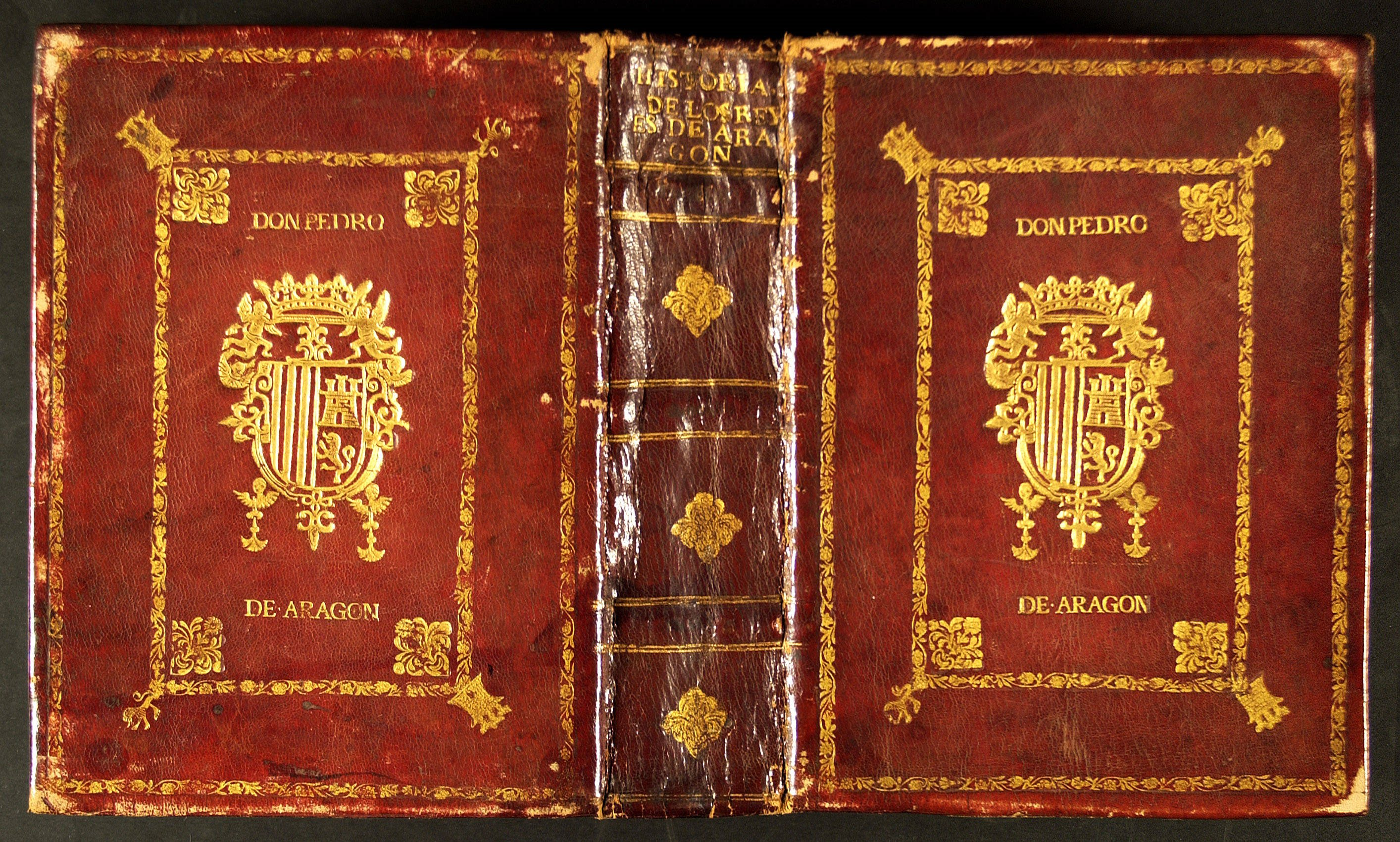 Guardes del manuscrit de la crònica de Ramon Muntaner que hi havia a la biblioteca de Poblet, procedent de la donació efectuada el 1667 per Pere Antoni d'Aragó